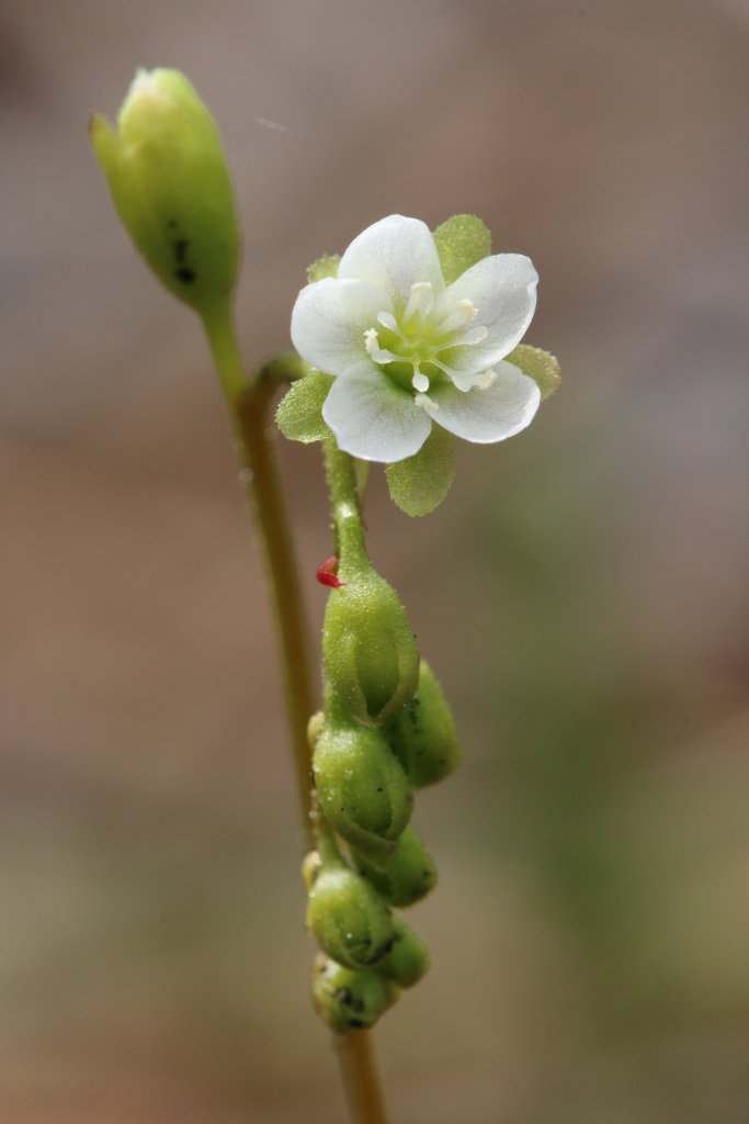 Drosera rotundifolia , Gironde, France